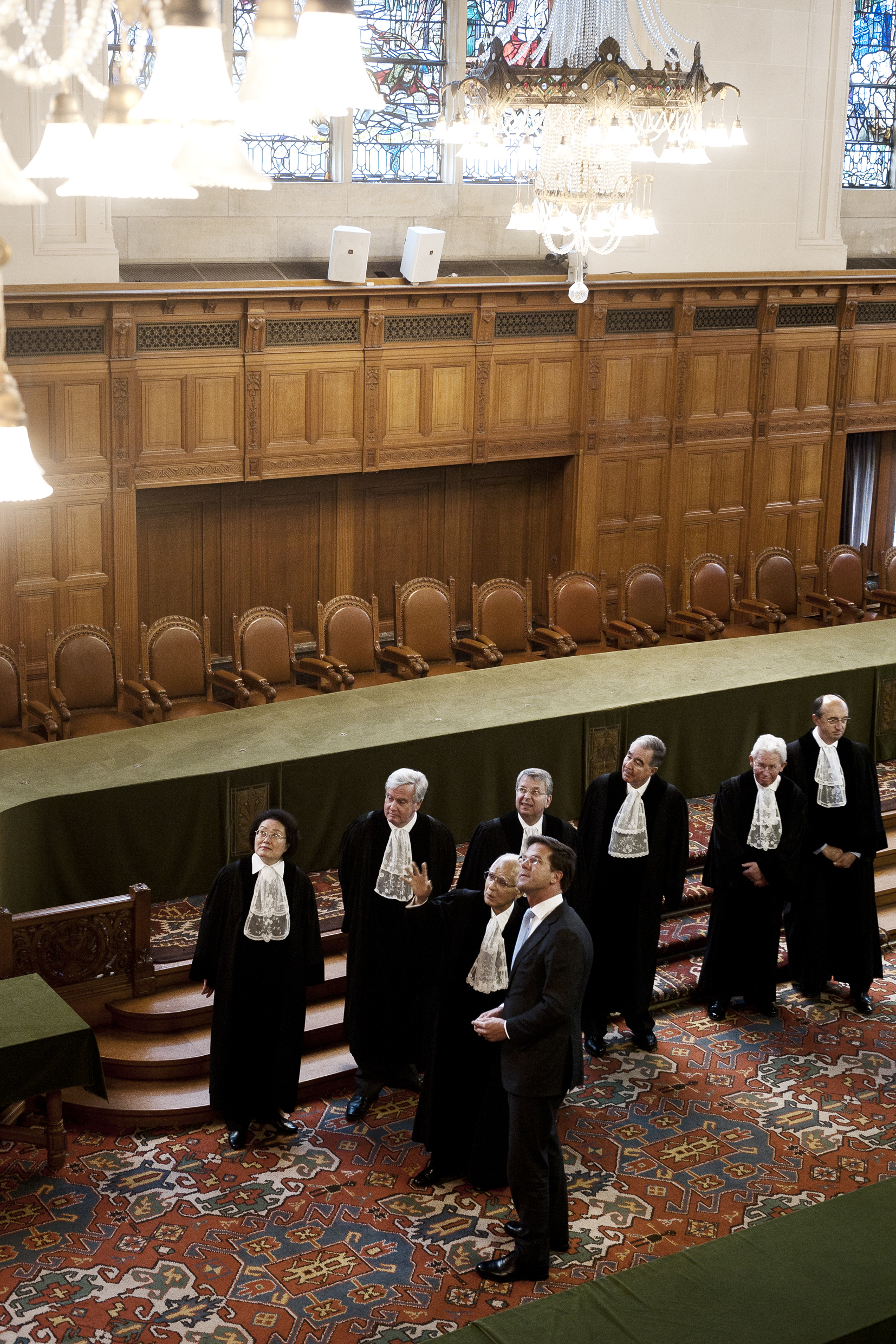 Minister-president Rutte tijdens zijn bezoek aan het Internationaal Gerechtshof. Het Internationaal Gerechtshof is gevestigd in het Vredespaleis in Den Haag. Het Hof is de hoogste rechtsprekende instantie in de wereld en behandelt geschillen tussen staten. Als enig hoofdorgaan van de VN is het niet in New York maar in Den Haag gevestigd, de juridische hoofdstad van de wereld.